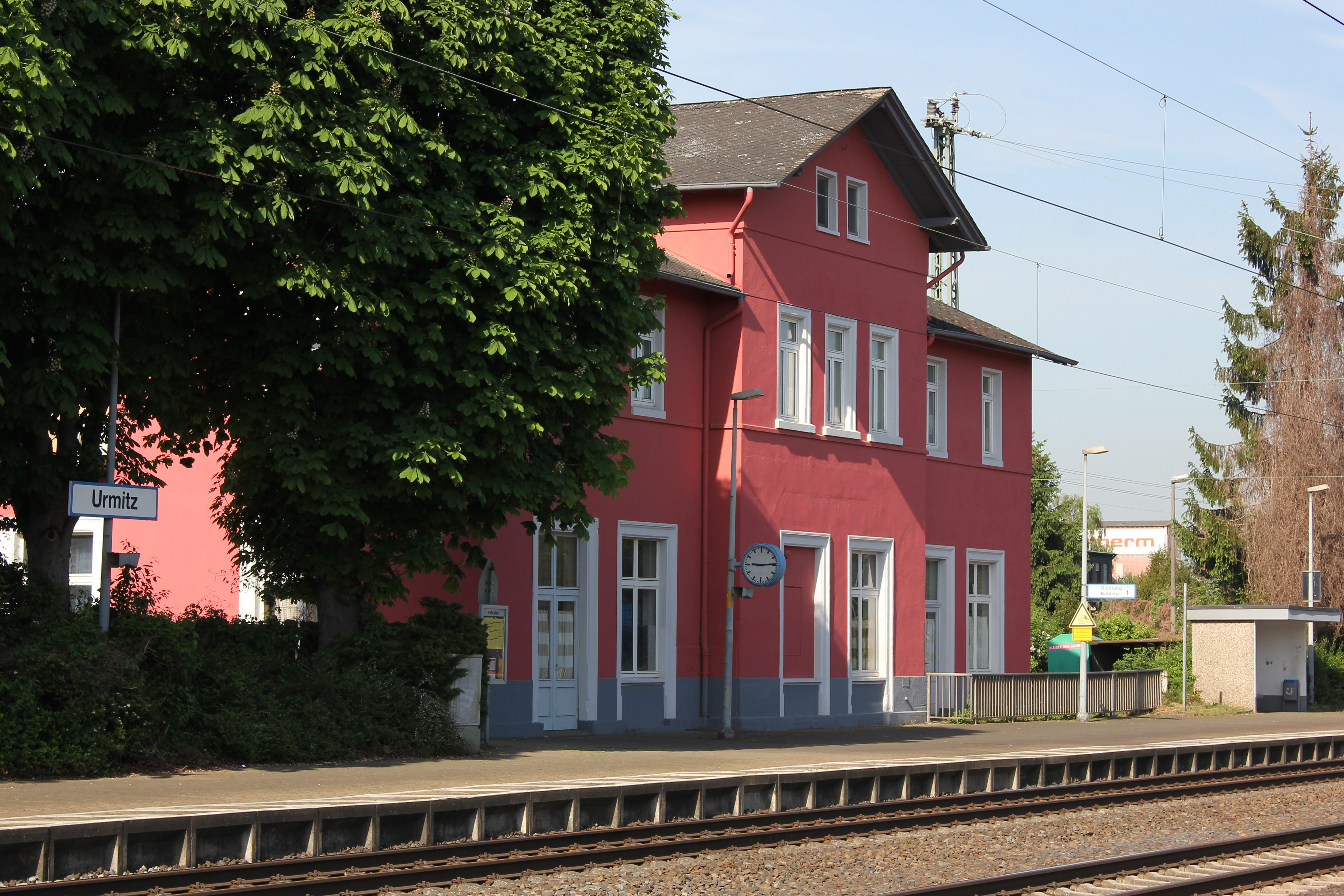 Bahnhof Urmitz in Mülheim-Kärlich, erbaut 1876, heute in Privatbesitz. Der Bahnhof liegt in der ehemaligen Gemarkung Mulheim (seit 1969 Mülheim-Kärlich), wurde aber nach dem bezüglich Bebauung näher gelegenen Ort Urmitz benannt.